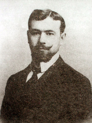 Александр Алексеевич Ханжонков